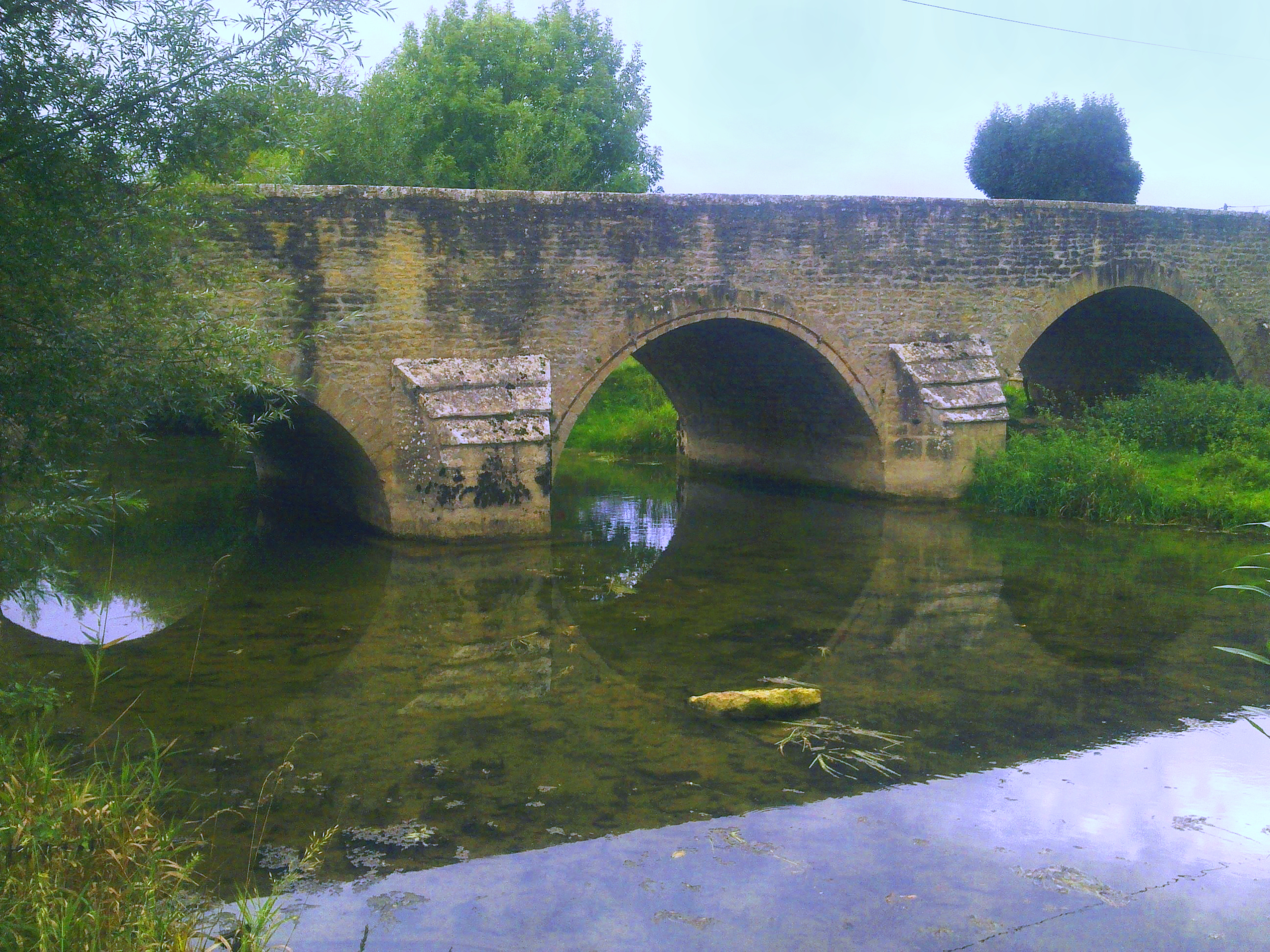 Pont sur la Seine à Etrochey (France)